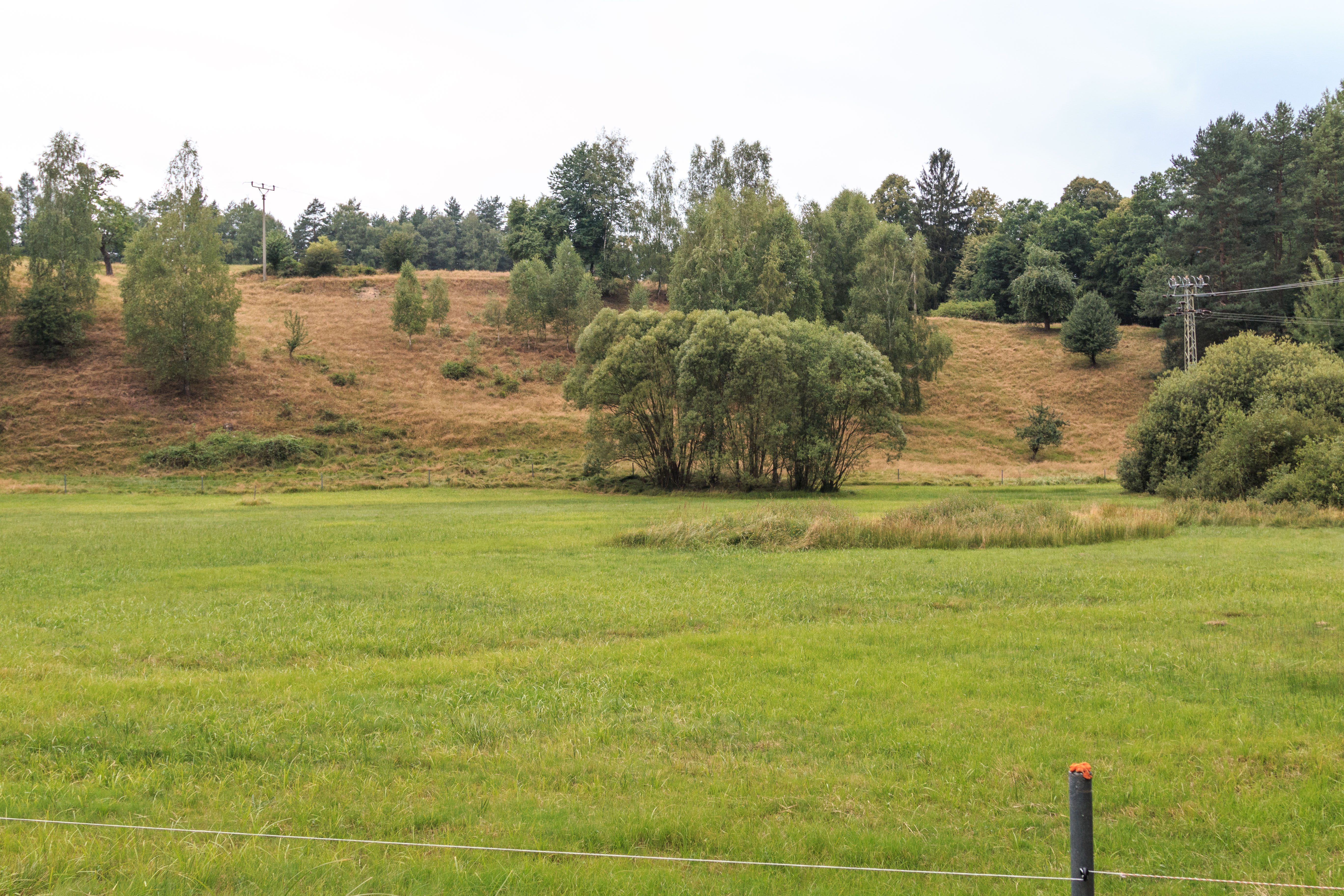 Přírodní rezervace Za pilou Project: Chráněná území.